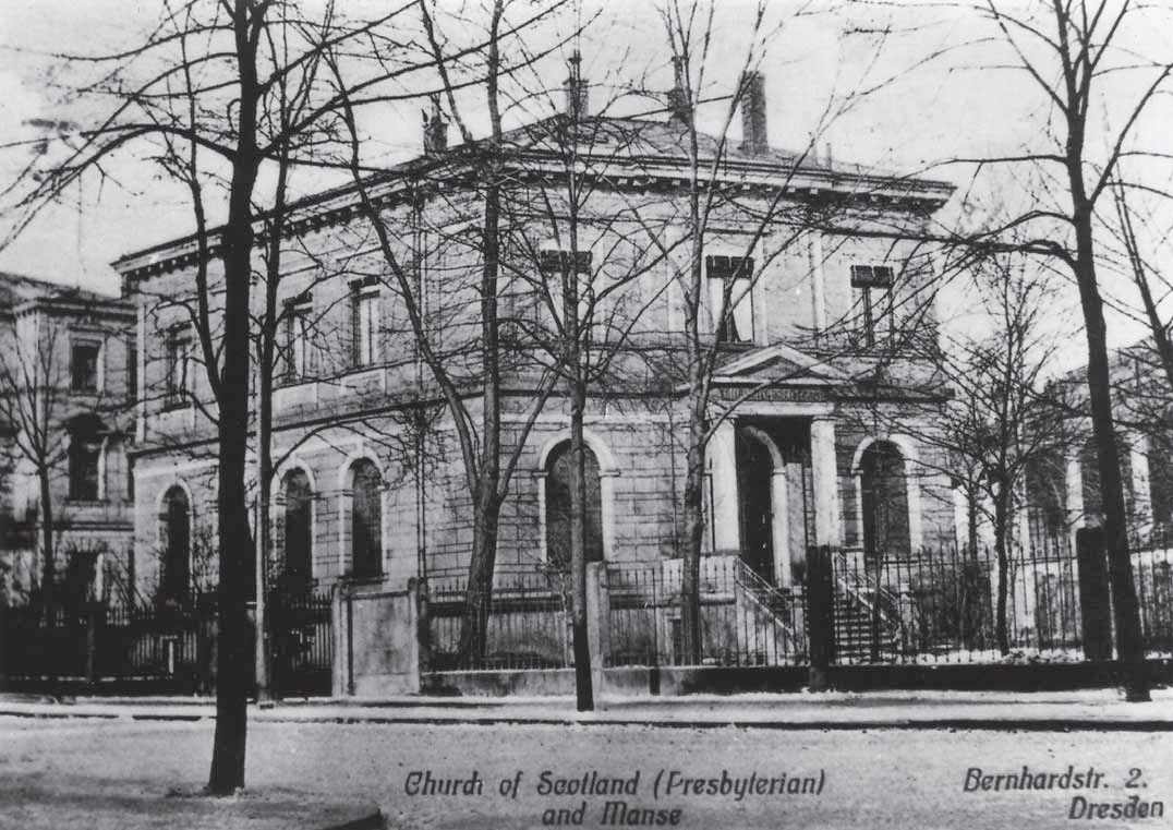 Dresden, Schottische Kirche (1884–1915)